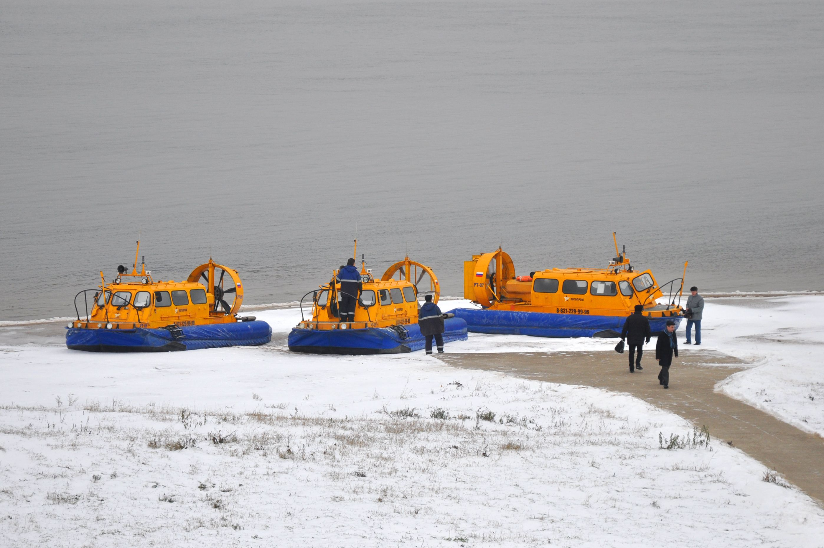 Суда на воздушной подушке Хивус-10 стоят на нижегородском причале компании Логопром - Борский перевоз. Данные суда работают в качестве пассажирских на переправе между городами Нижний Новгород - Бор.